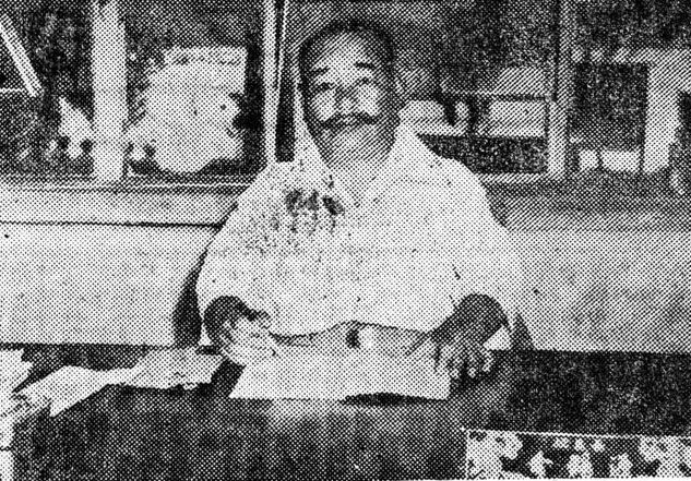 성남중고교장실에 앉아있는 김석원